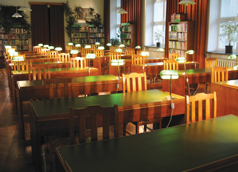 III Czytelnia Naukowa, Biblioteka Publiczna w Dzielnicy Wola m.st. Warszawy